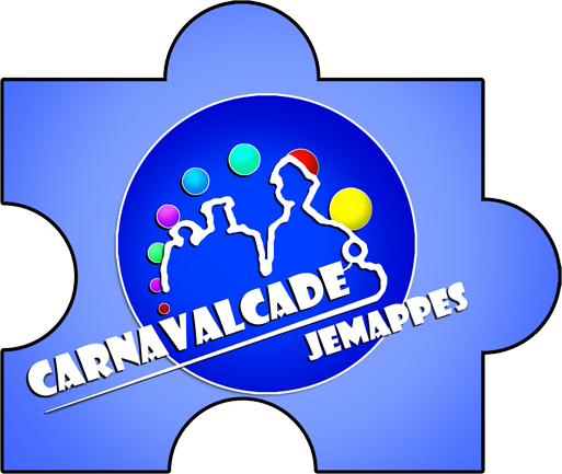 Logo du comité Carnavalcade